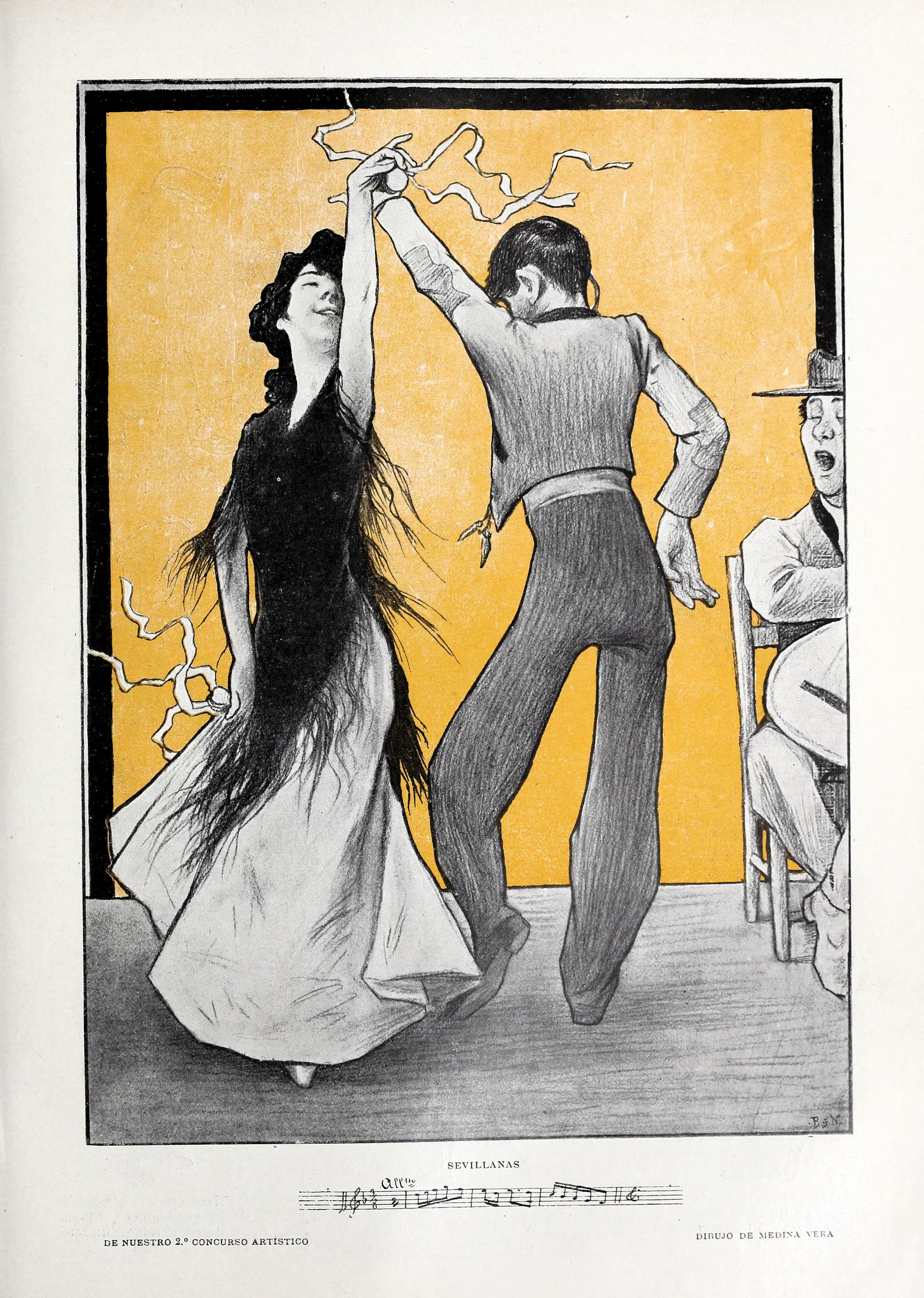 Sevillanas.